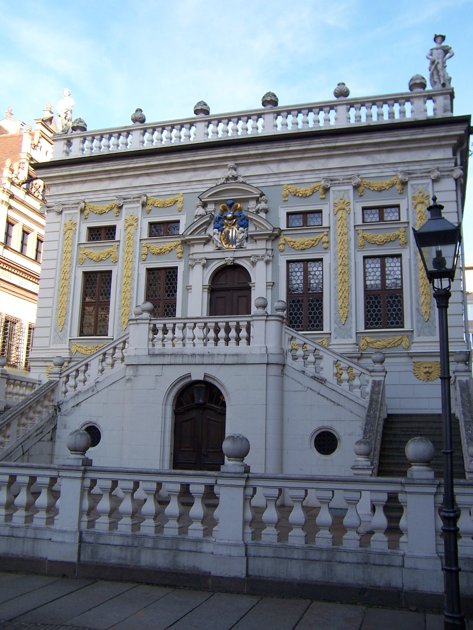 Alte Börse in Leipzig, Sachsen eigene Aufnahme vom 15. Januar 2007